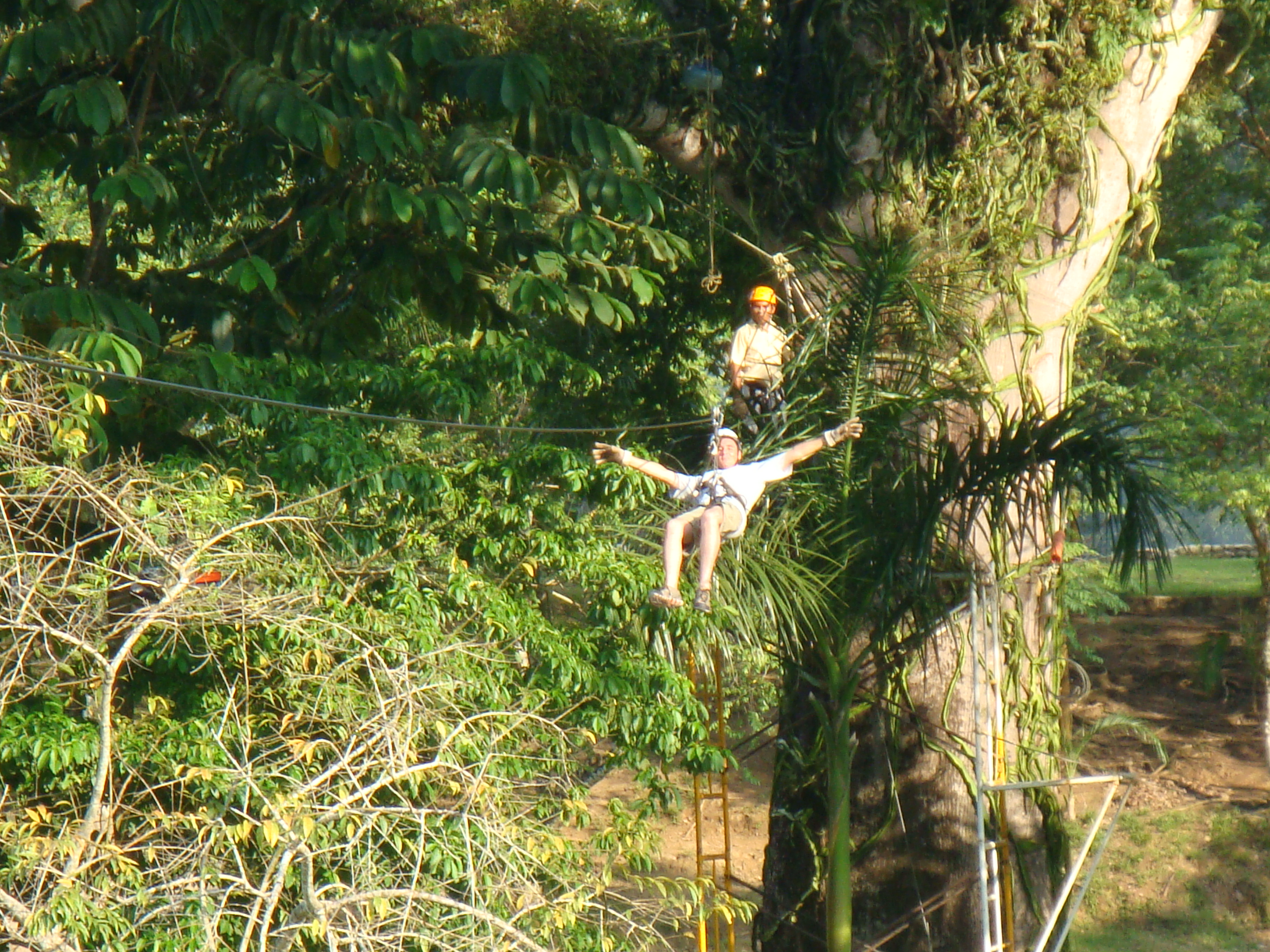 Canoppy, en Tapijulapa, Municipio de Tacotalpa, Tabasco, México